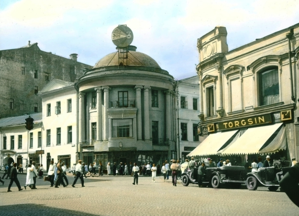 Москва. ТОРГСИН